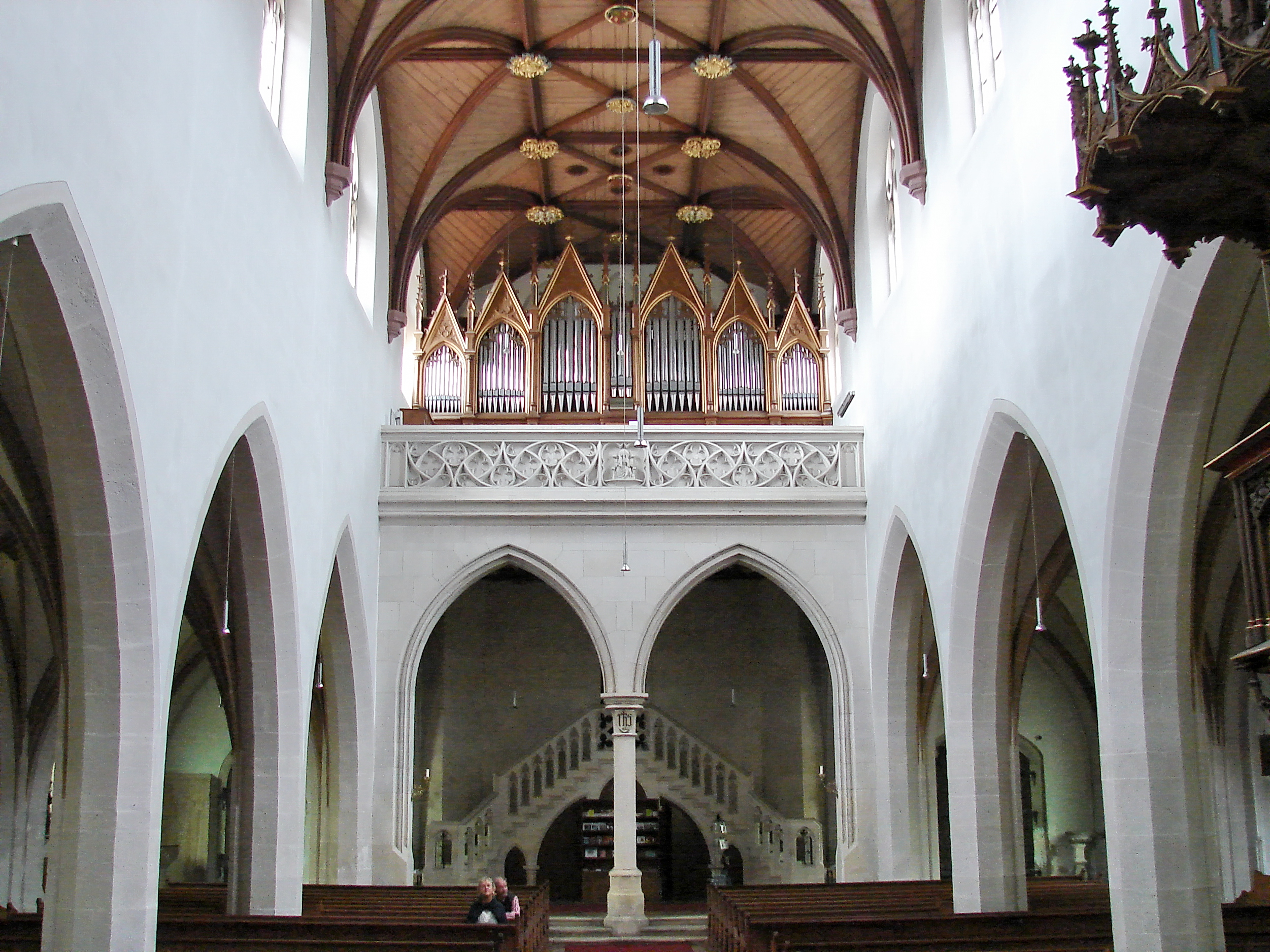 Katholische Pfarrkirche Mariä Himmelfahrt in KelheimThis is a photograph of an architectural monument.